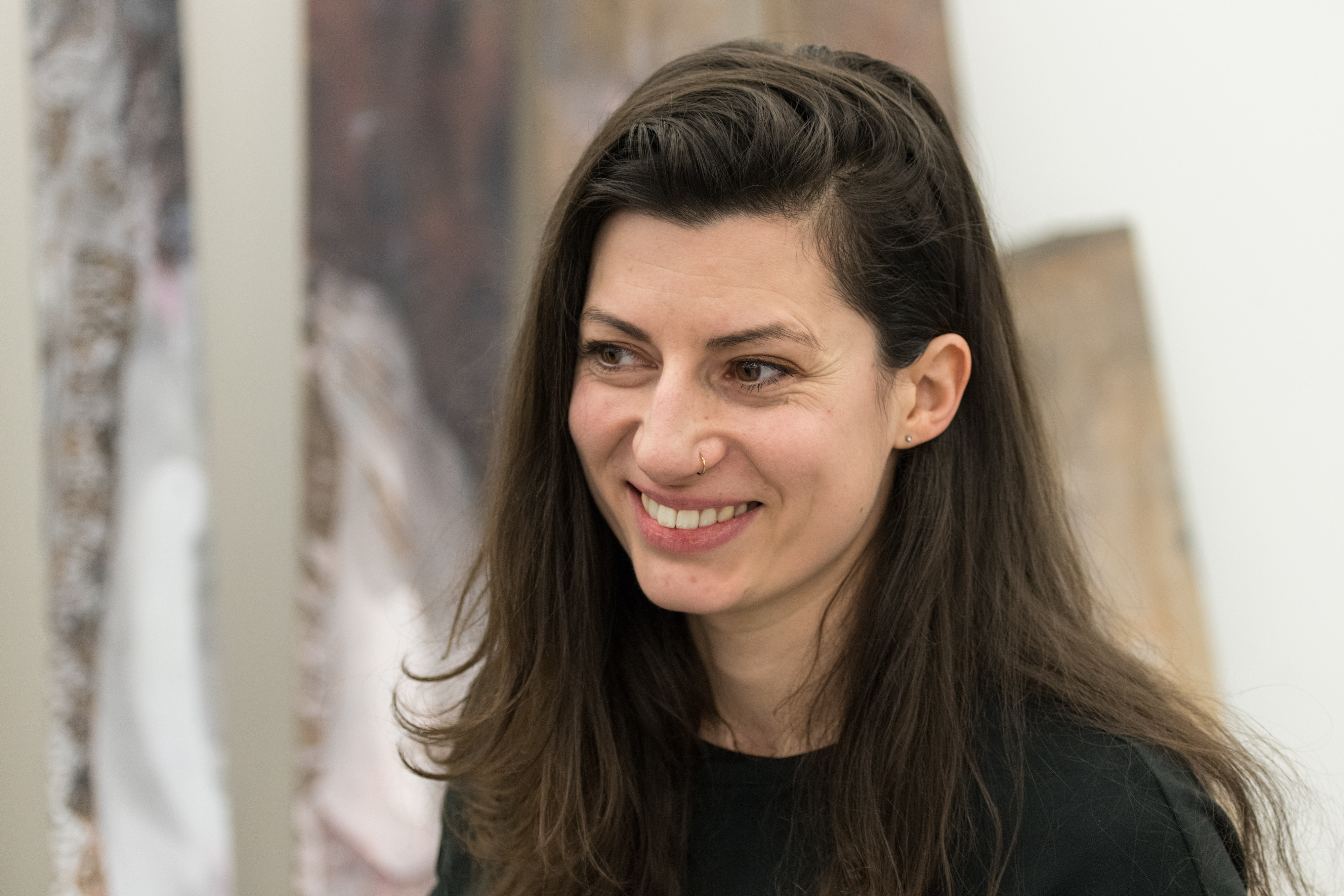 Lena Göbel bei der Eröffnung der Ausstellung Lena Göbel und Maria Moser im Museum Angerlehner in Thalheim bei Wels